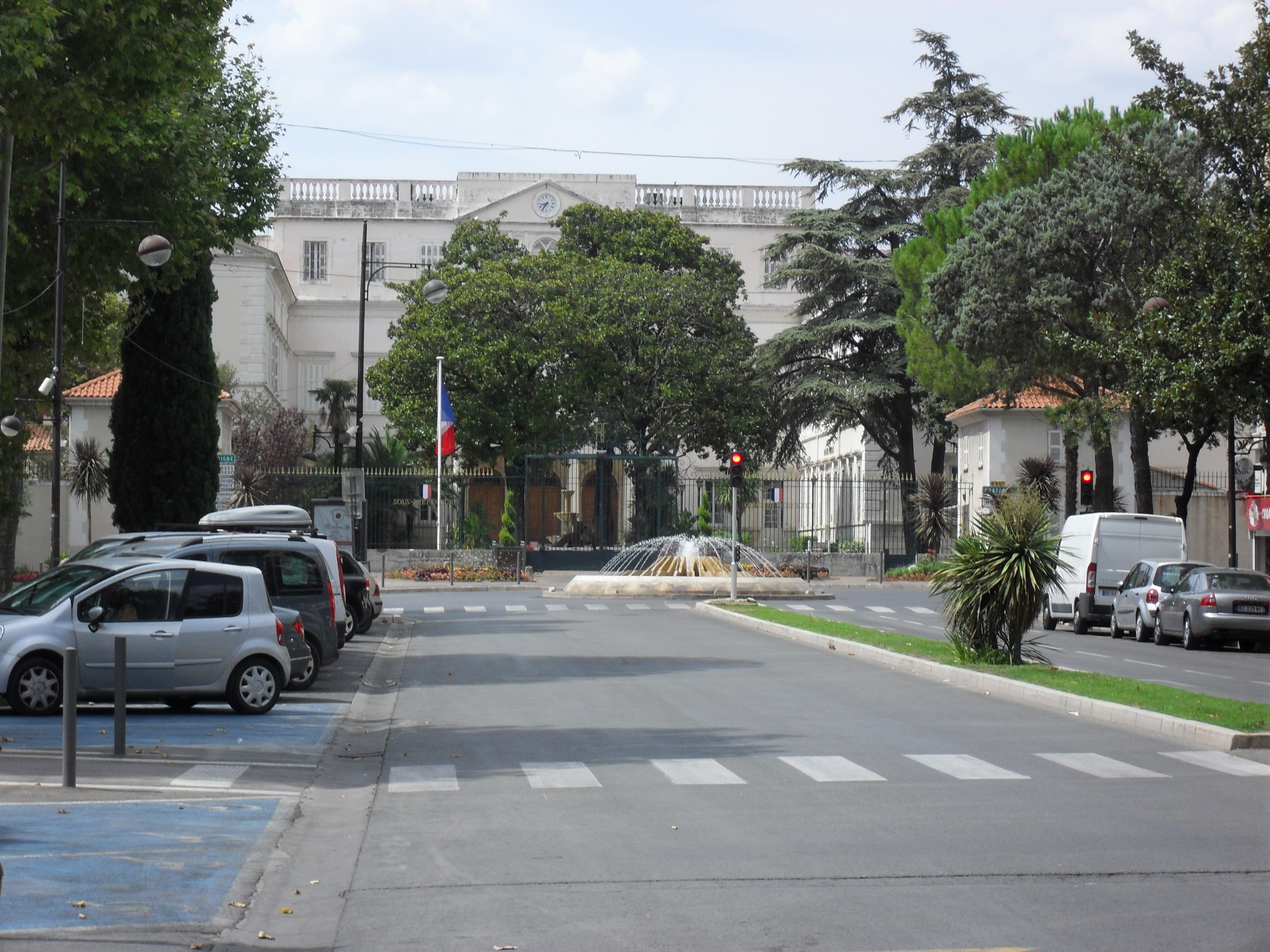 Sous-préfecture de Draguignan, vue depuis la fin des Allées d'Azémar.